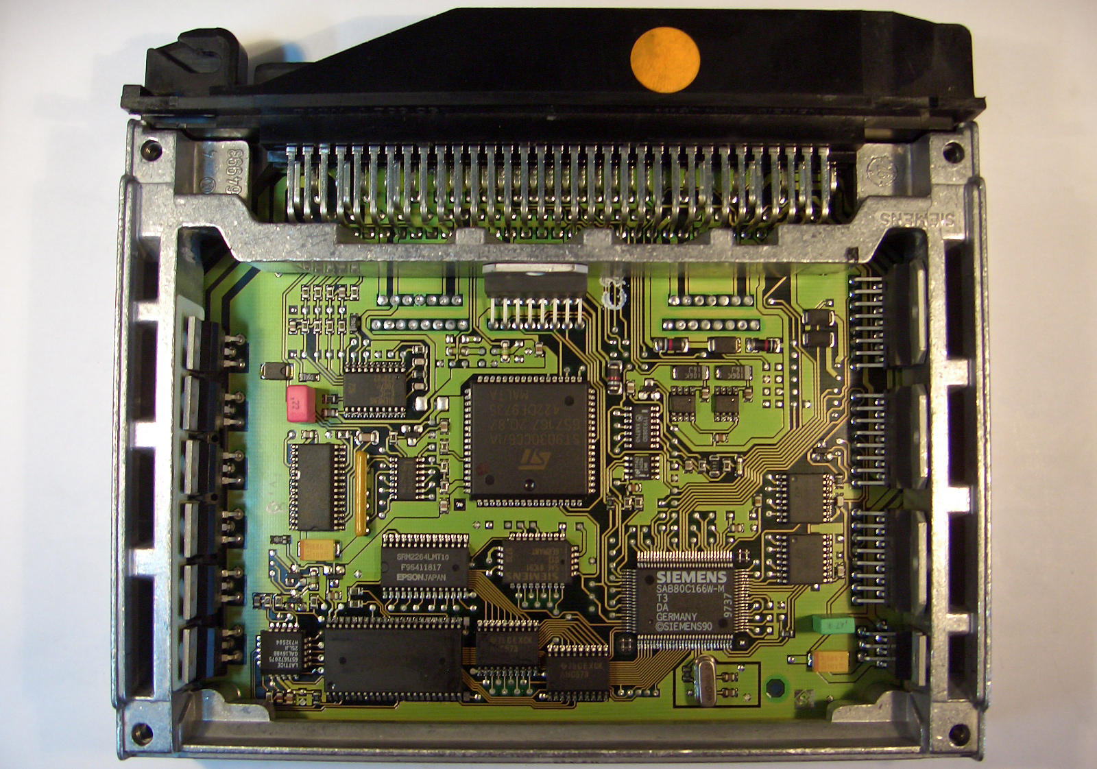 Chiptuning előtt álló ECU (Electronic Controller Unit) egy BMW 528i-ből.